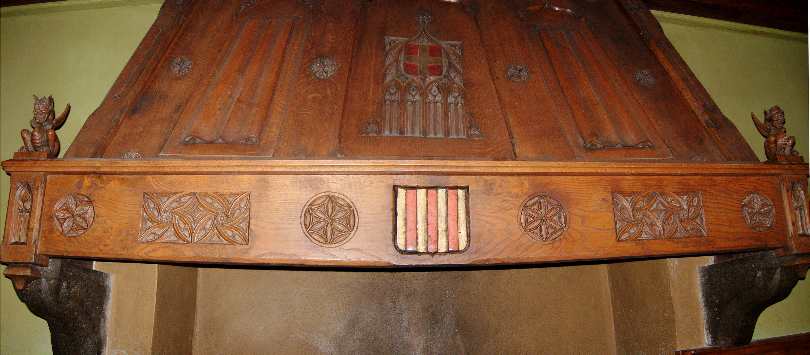 Photo de la cheminé intérieur du réfectoire de l'abbaye de Sixt Fer-à-Cheval.